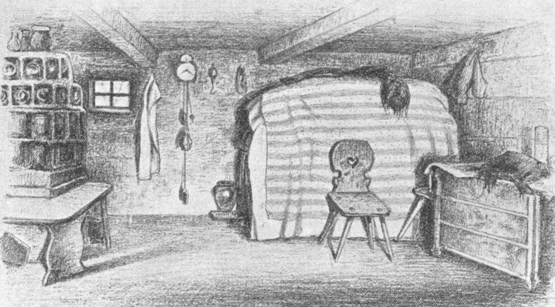 Originalbildunterschrift: Stube aus Burg i. Spr.